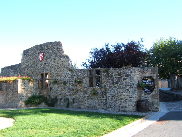 L'entrée du village de Ternand, dans le Beaujolais (France)